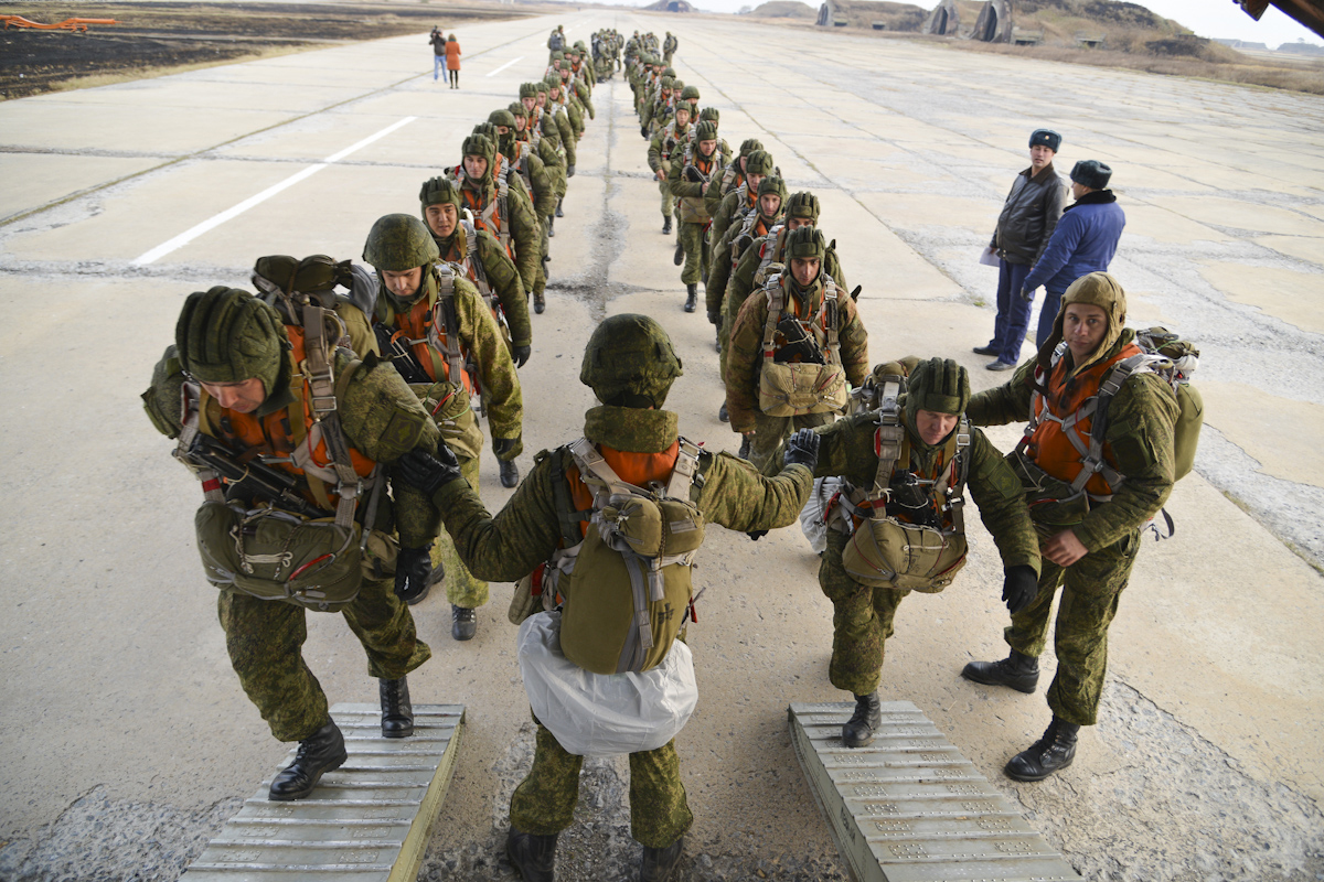 Парашютисты 83-й отдельной десантно-штурмовой бригады заходят в Ил-76 в парашютных системах Д-10 во время активной фазы тактического учения с соединением ВДВ в Уссурийске.